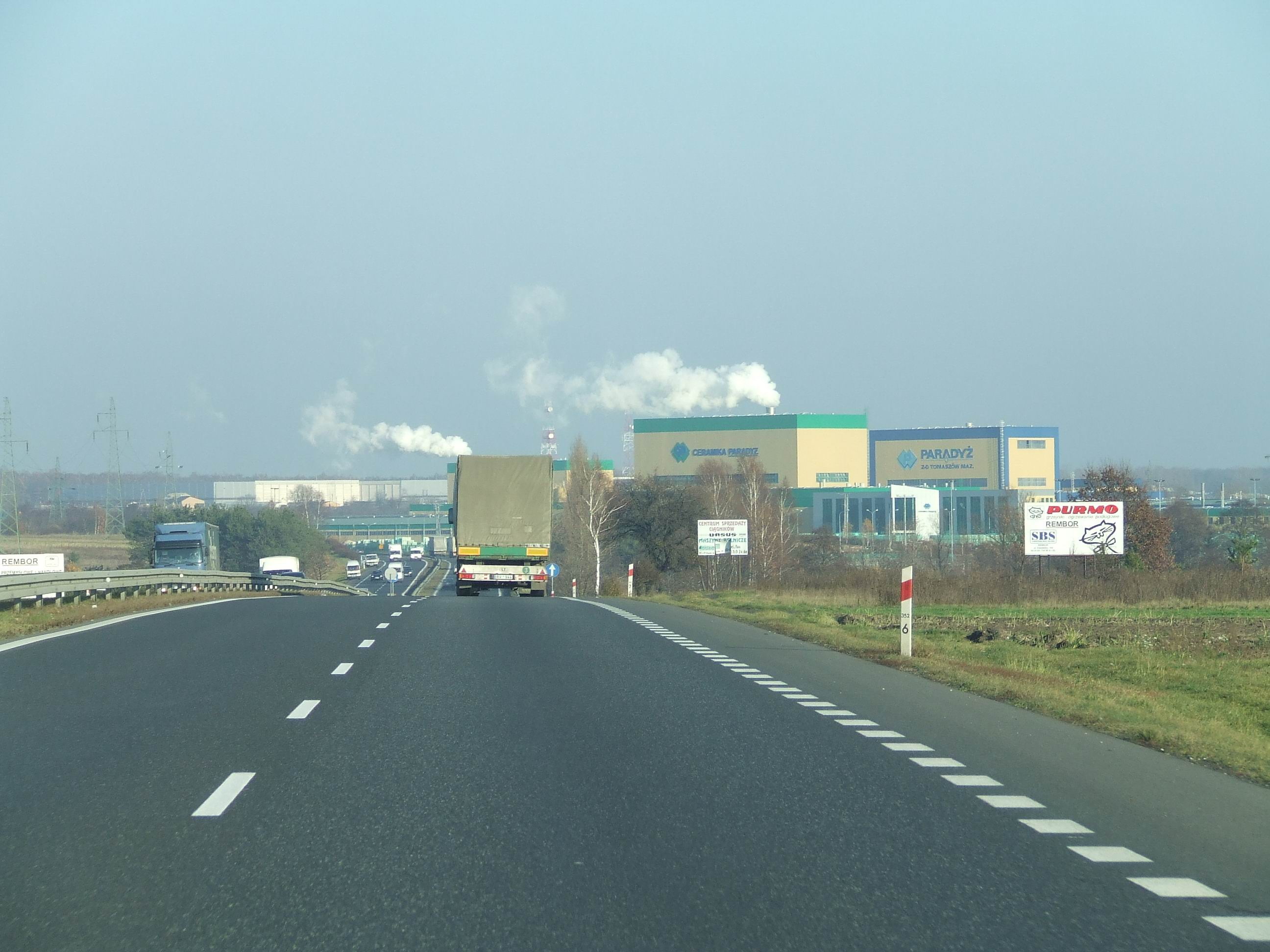 Tomaszów Mazowiecki, Ceramika Paradyż